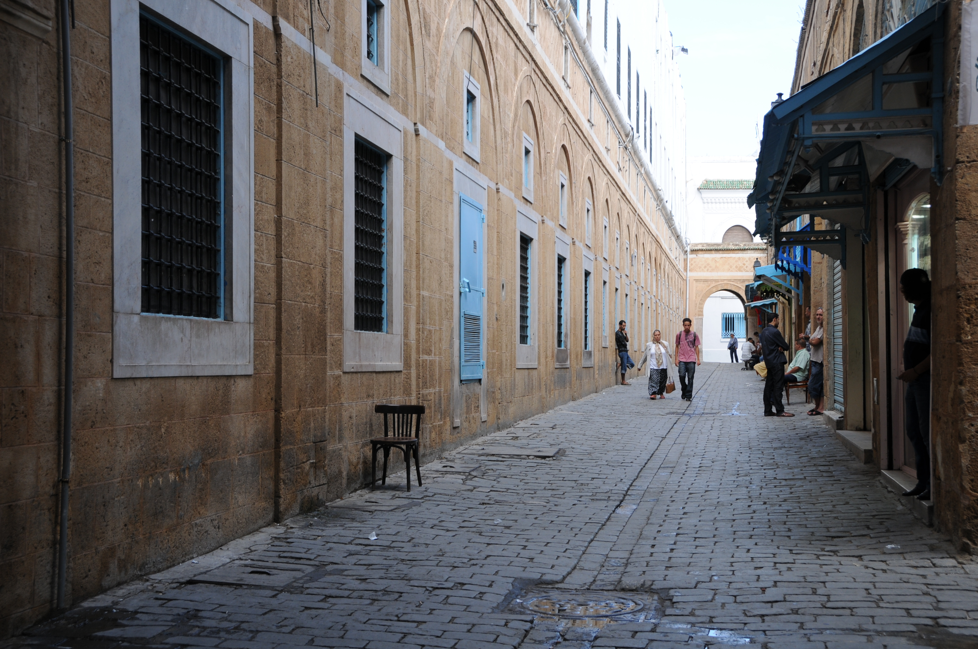 Souk El Bey dans la médina de Tunis (derrière l'immeuble du premier ministère).